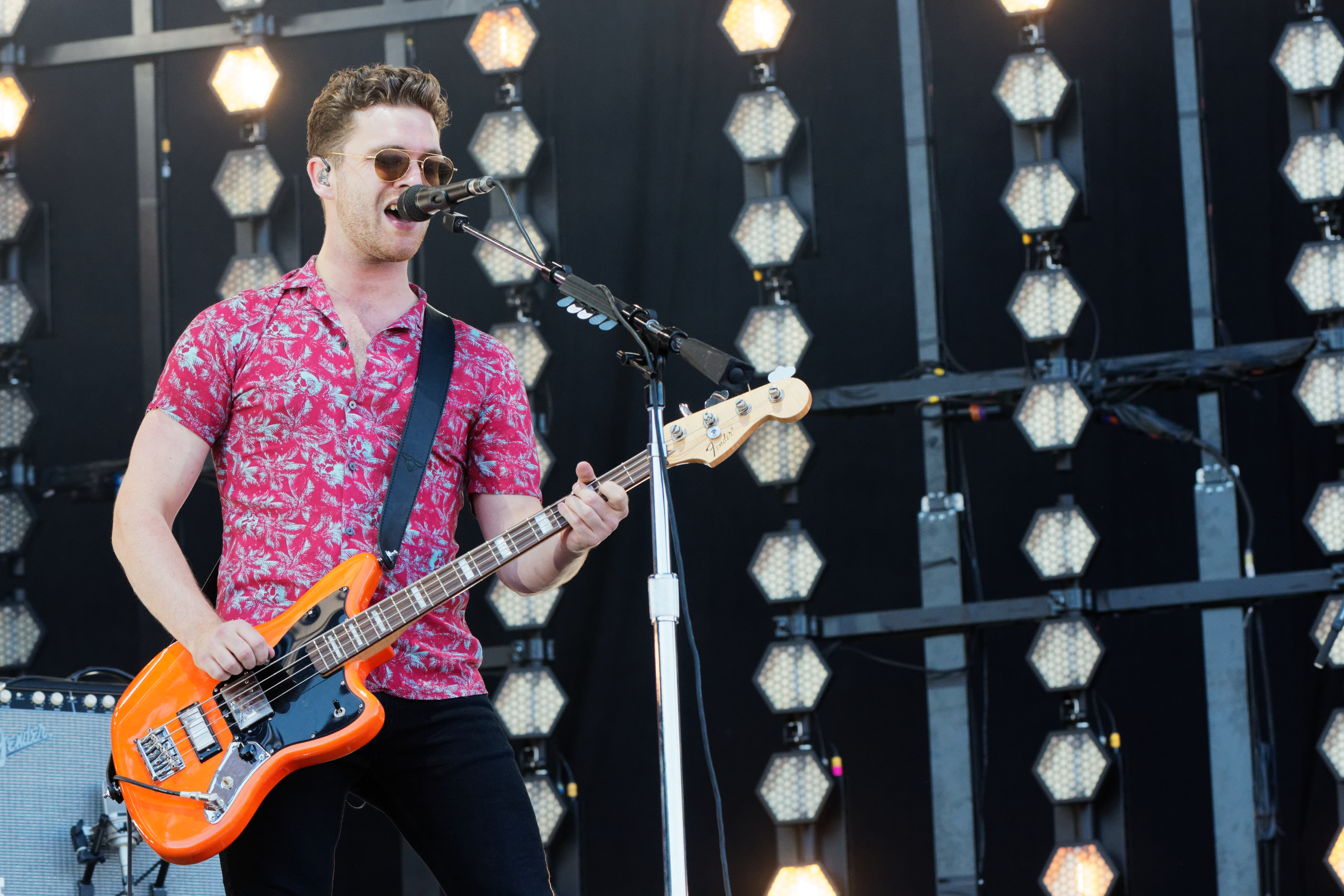 Royal Blood en concert lors du festival des vieilles charrues 2017.